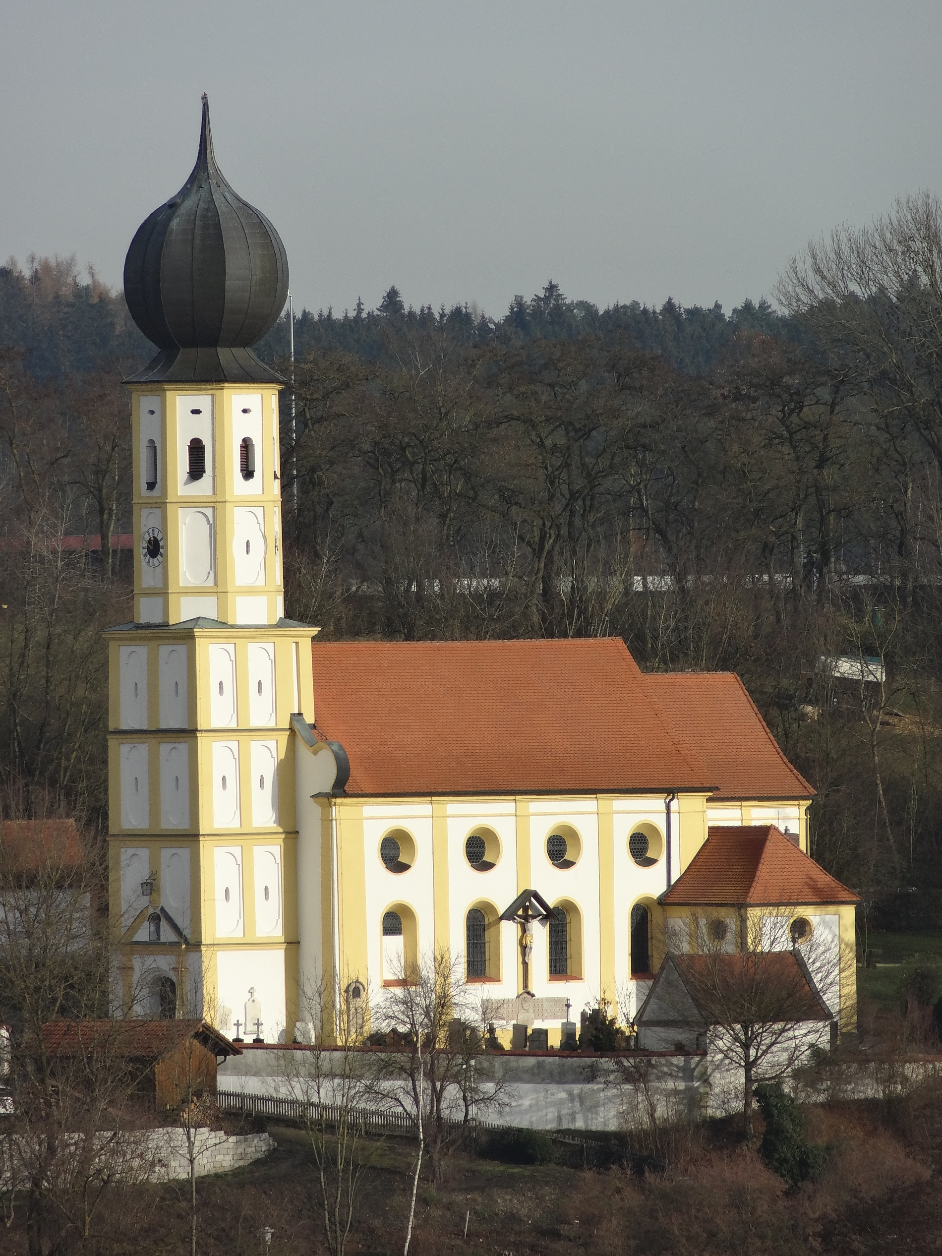 Katholische Pfarrkirche Mariä Himmelfahrt in Oberglaim; barocke Saalkirche, erbaut 1694-97 durch Hans Widtmann